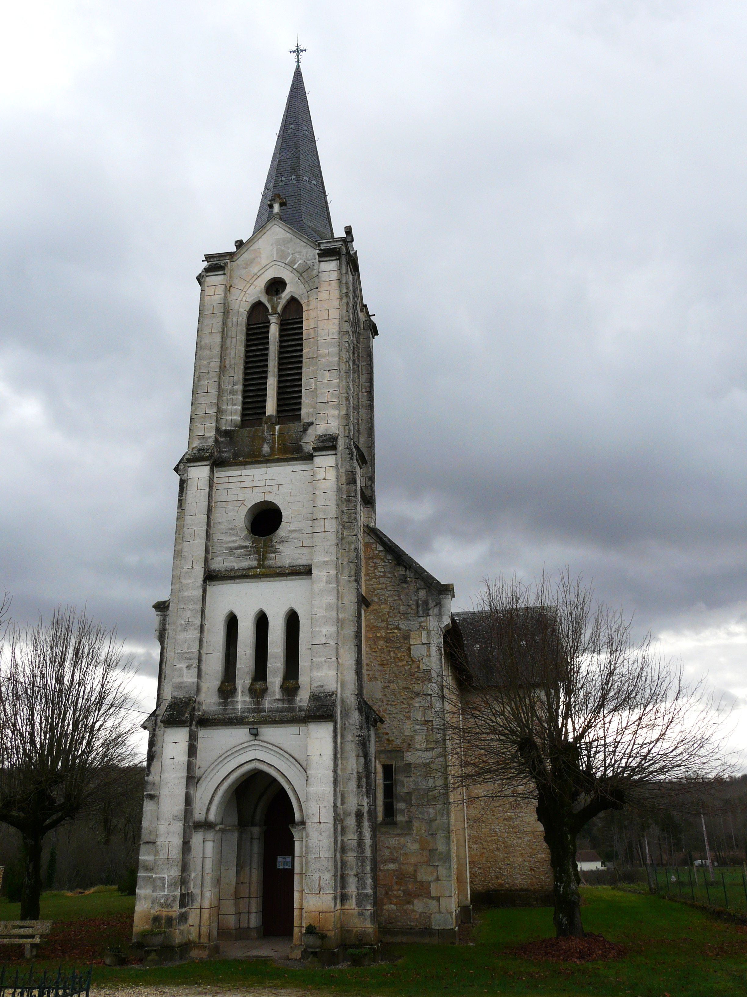 L'église Saint-Pierre-ès-Liens, Brouchaud, Dordogne, France